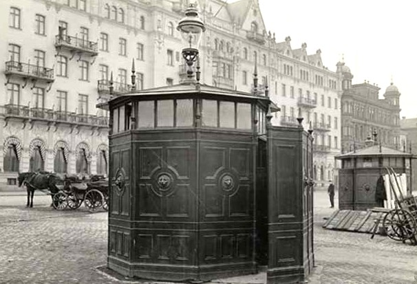 Bekvämlighetsinrättning i Stockholm vid Grand hotel